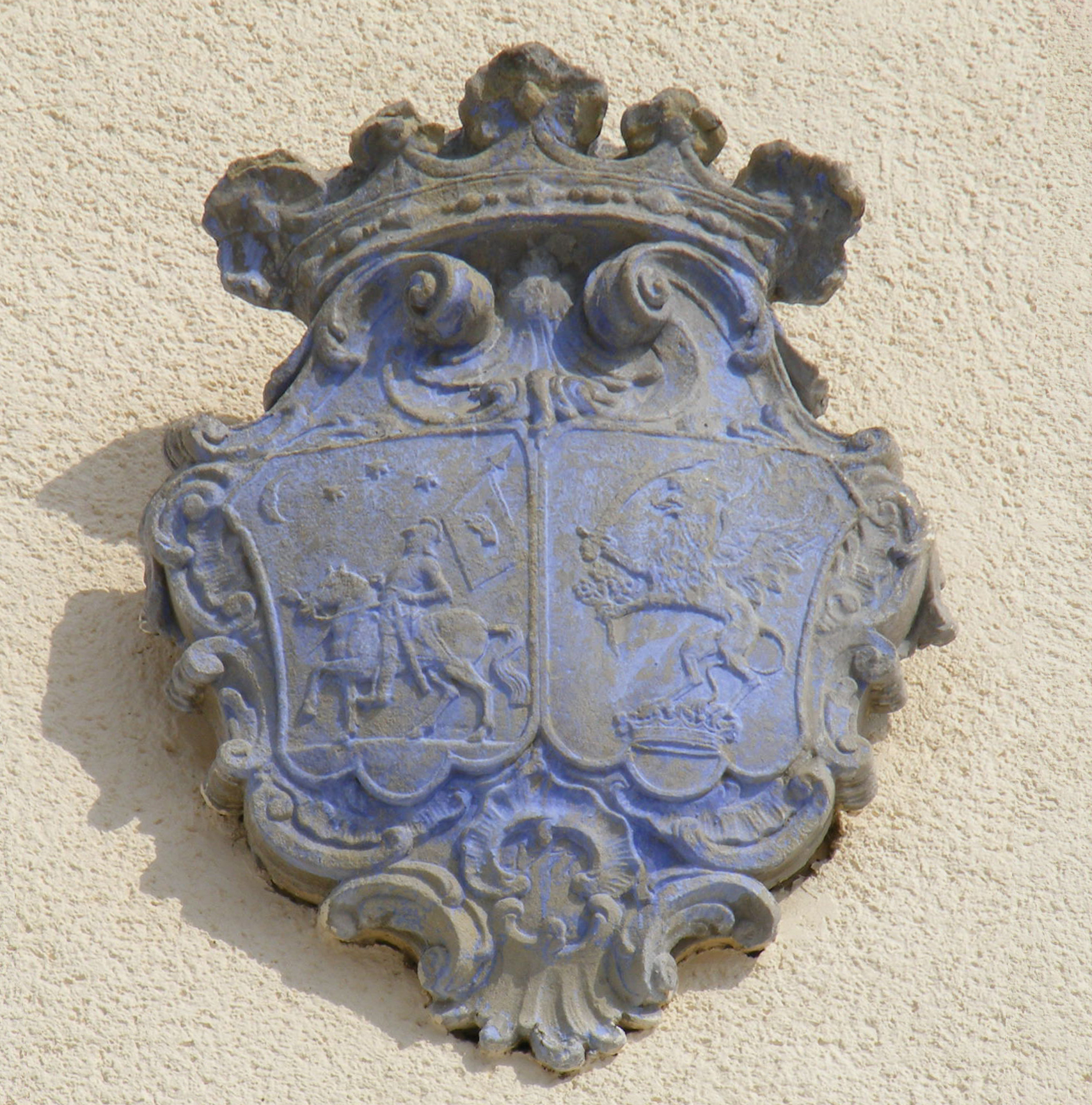 Erb na fasáde divinského kostola